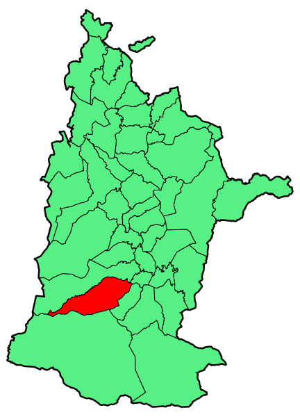 Lakarri-Arhane-Sarrikotagaine udalerriaren kokapena zuberoan